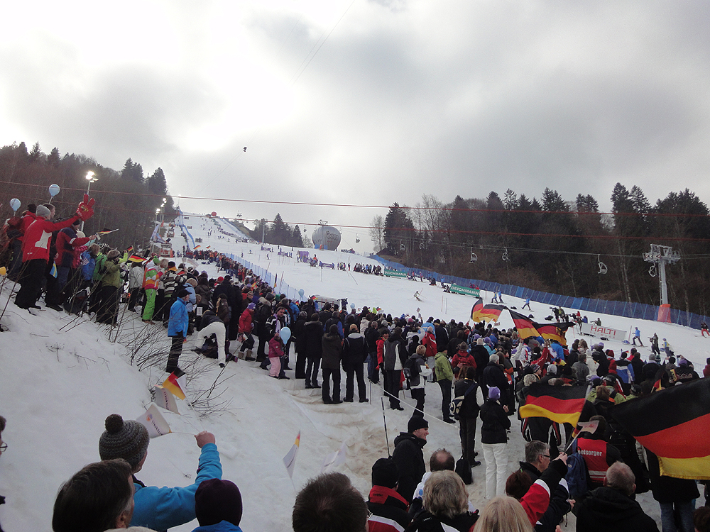 Der Gudiberg während des Slaloms der Damen bei der alpinen Ski-Weltmeisterschaft